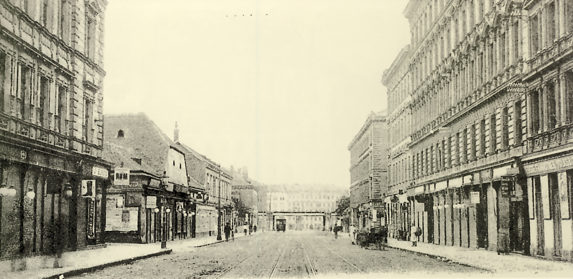 Favoritenstraße von der Huppgasse stadteinwärts gesehen im Jahr 1899, Photo von M. Sperling